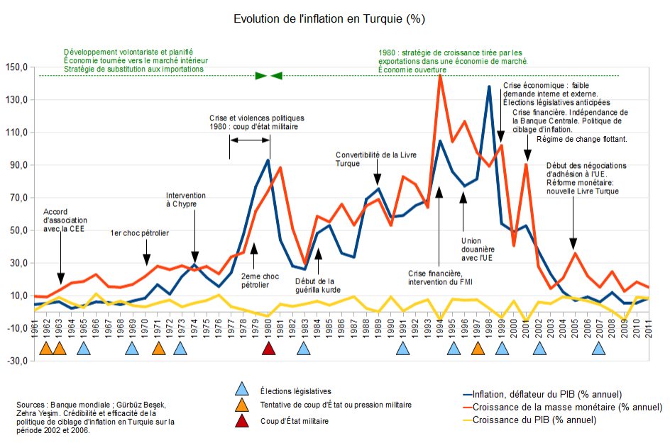 Evolution de l'inflation en Turquie - Sources: Banque Mondiale; Gürbüz Beşek, Zehra Yeşim. Crédibilité et efficacité de la politique de ciblage d'inflation en Turquie sur la période 2002 et 2006